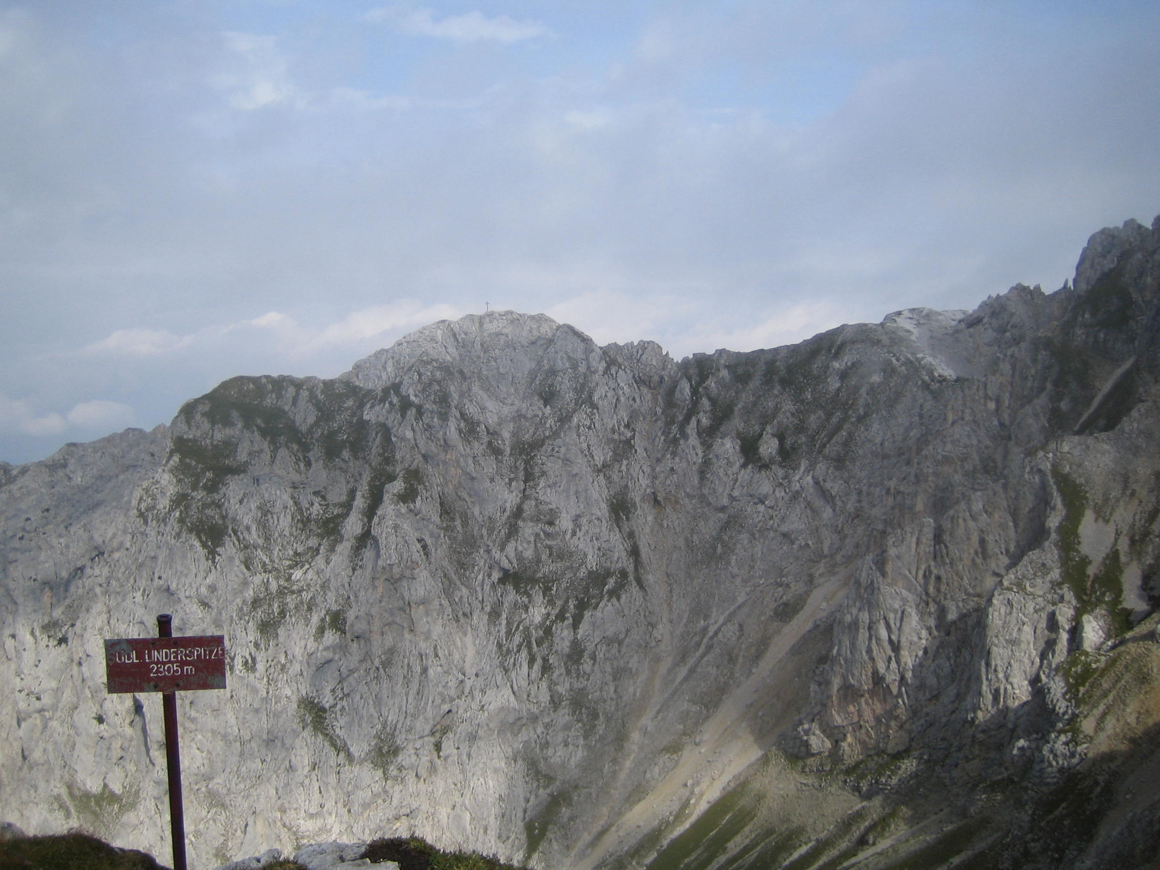 Südliche Linderspitze, auf dem Mittenwalder Höhenweg